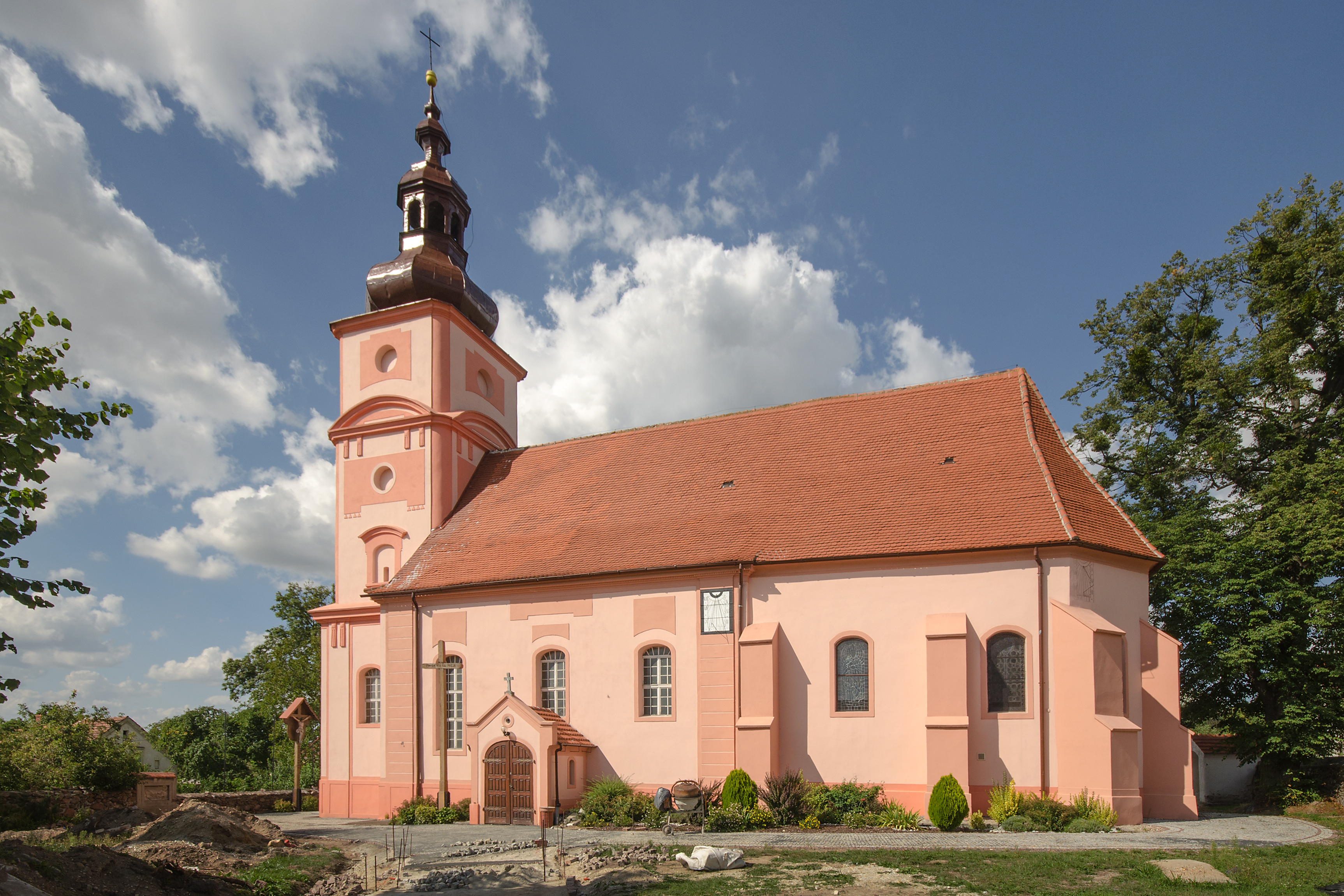 Wierzbnik - rzymskokatolicki kościół parafialny p.w. św. Michała Archanioła, XIV/XV, 1766